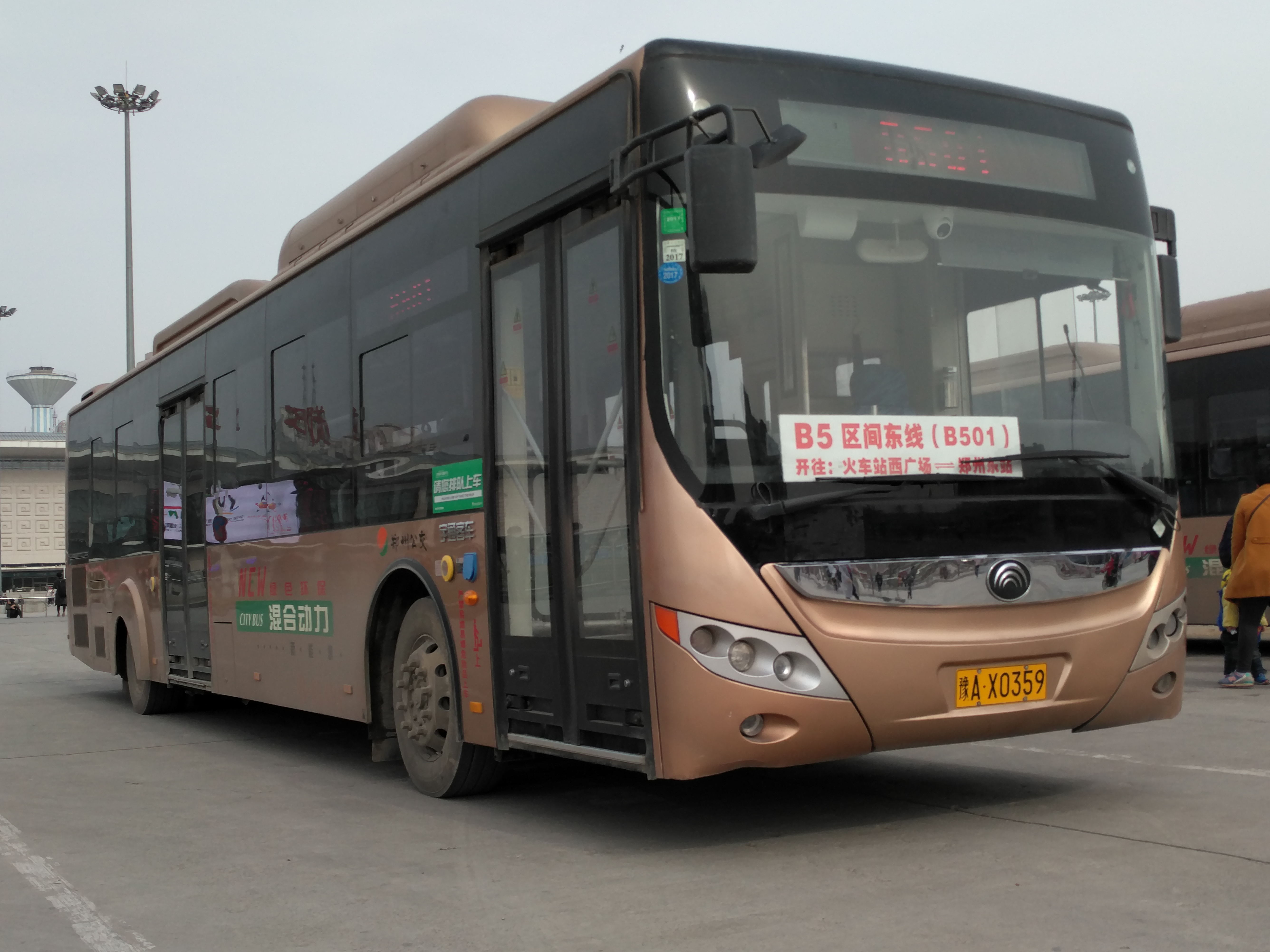 郑州快速公交B501路公交车停靠在郑州火车站西广场。